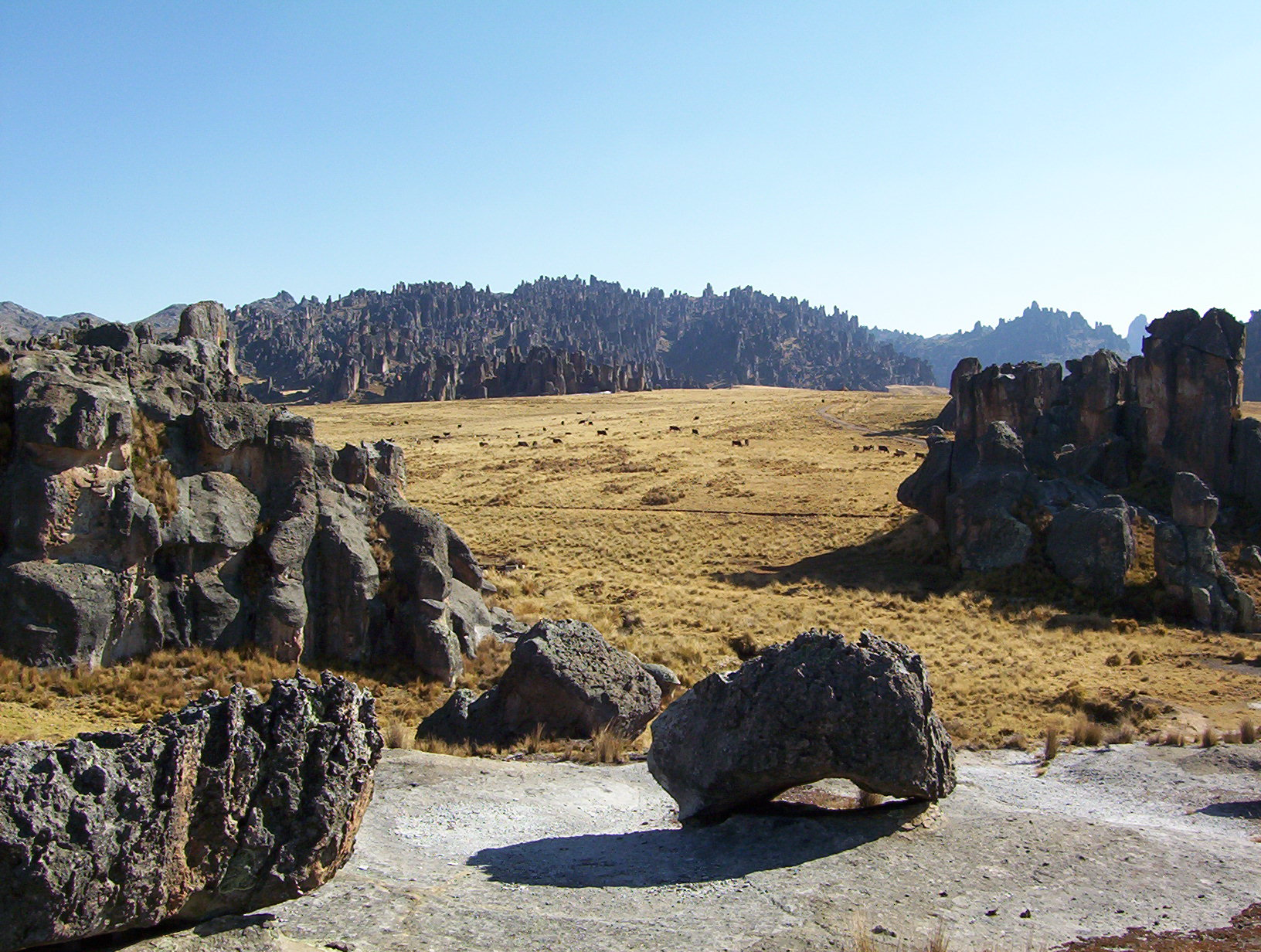 Bosque de Piedas en Huayllay - Pasco, Peru